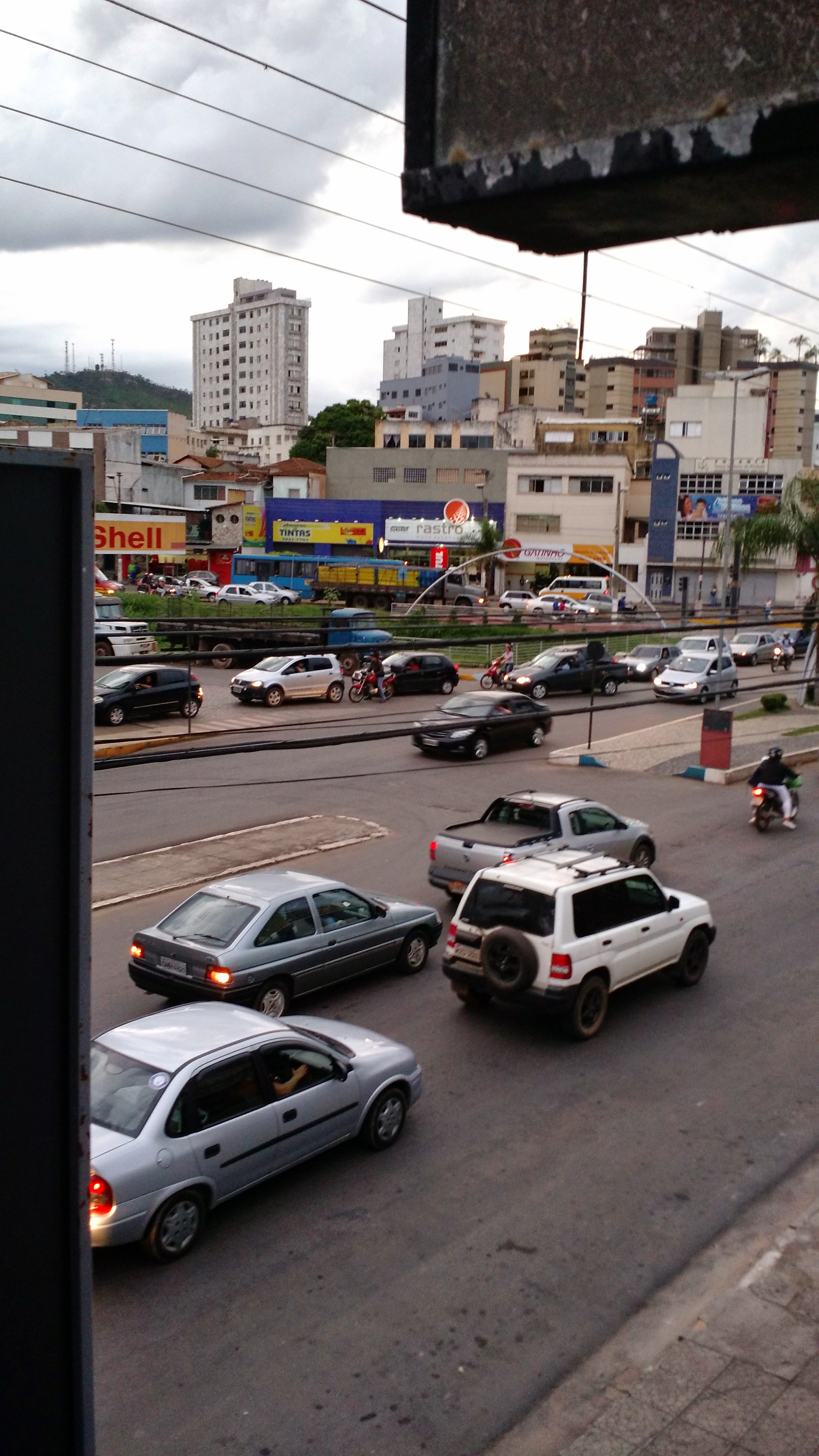 Transito na Avenida Presidente Vargas, umas das principais vias da cidade. Observada em Fevereiro de 2015 em um horário de pico.